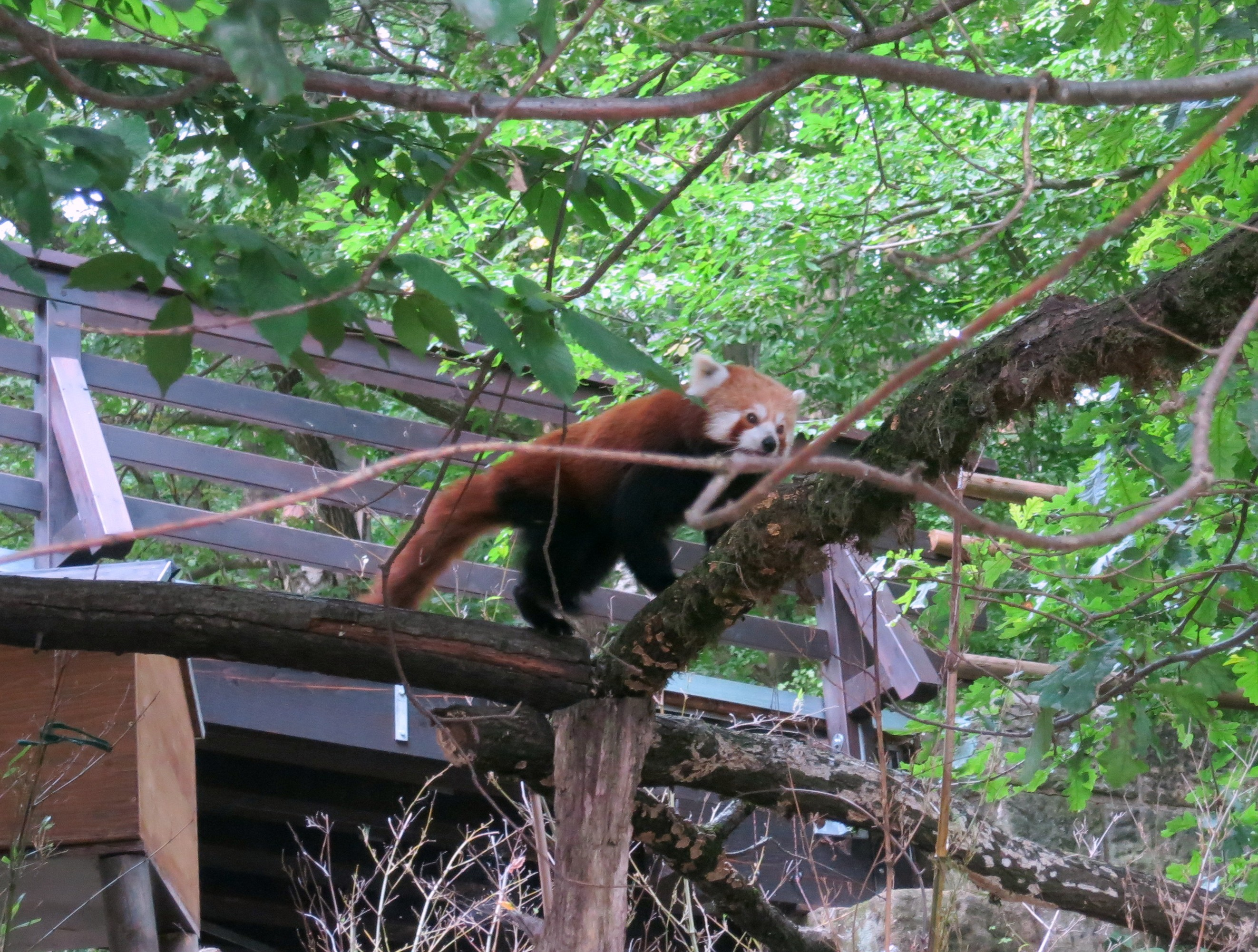 Tiergarten Nürnberg